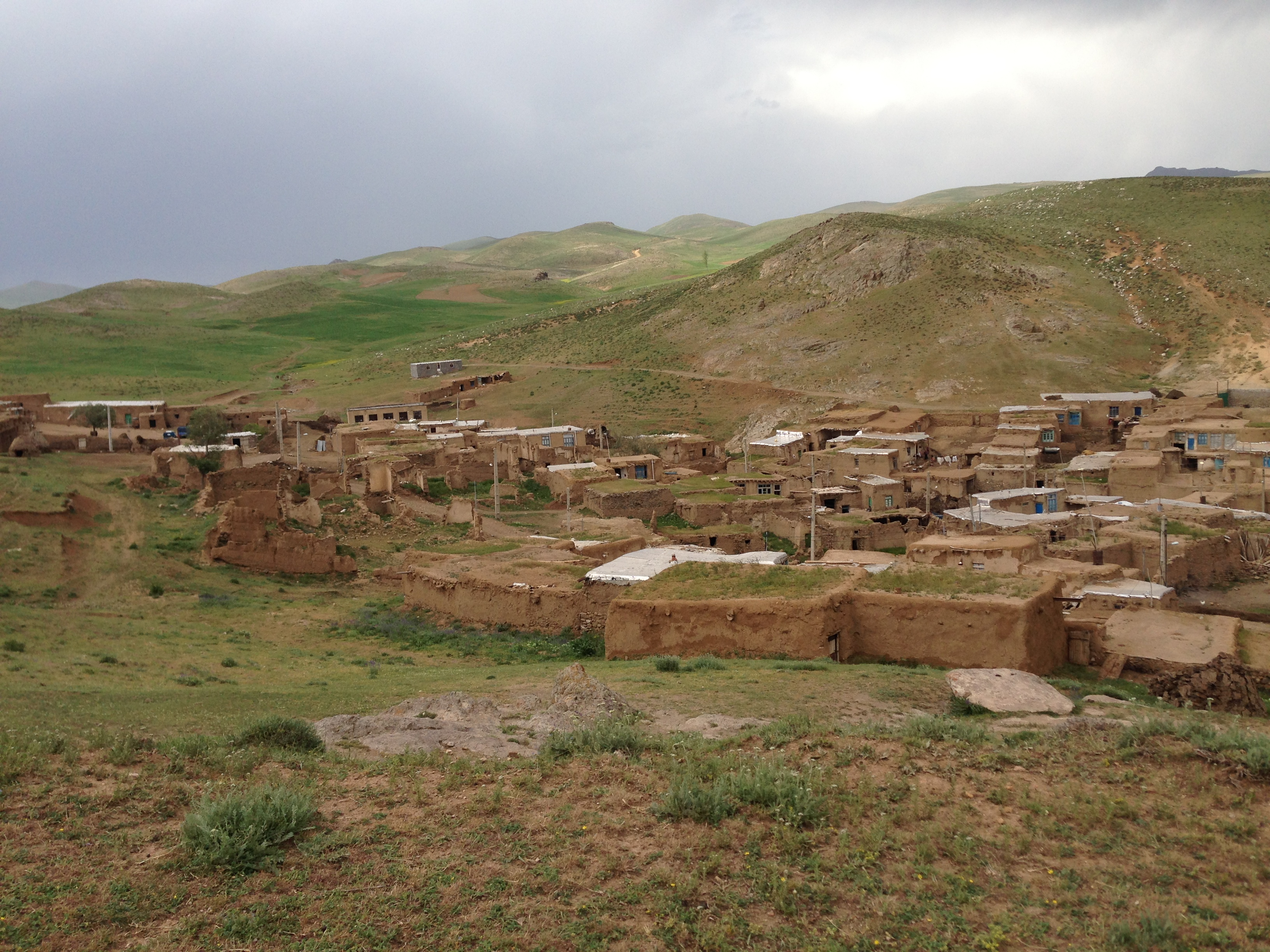 تصویری از روستای شاللو